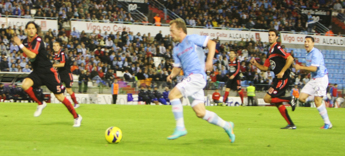 Unha xogada do partido Celta-Deportivo na tempada 2012-2013 o 27 de outubro.